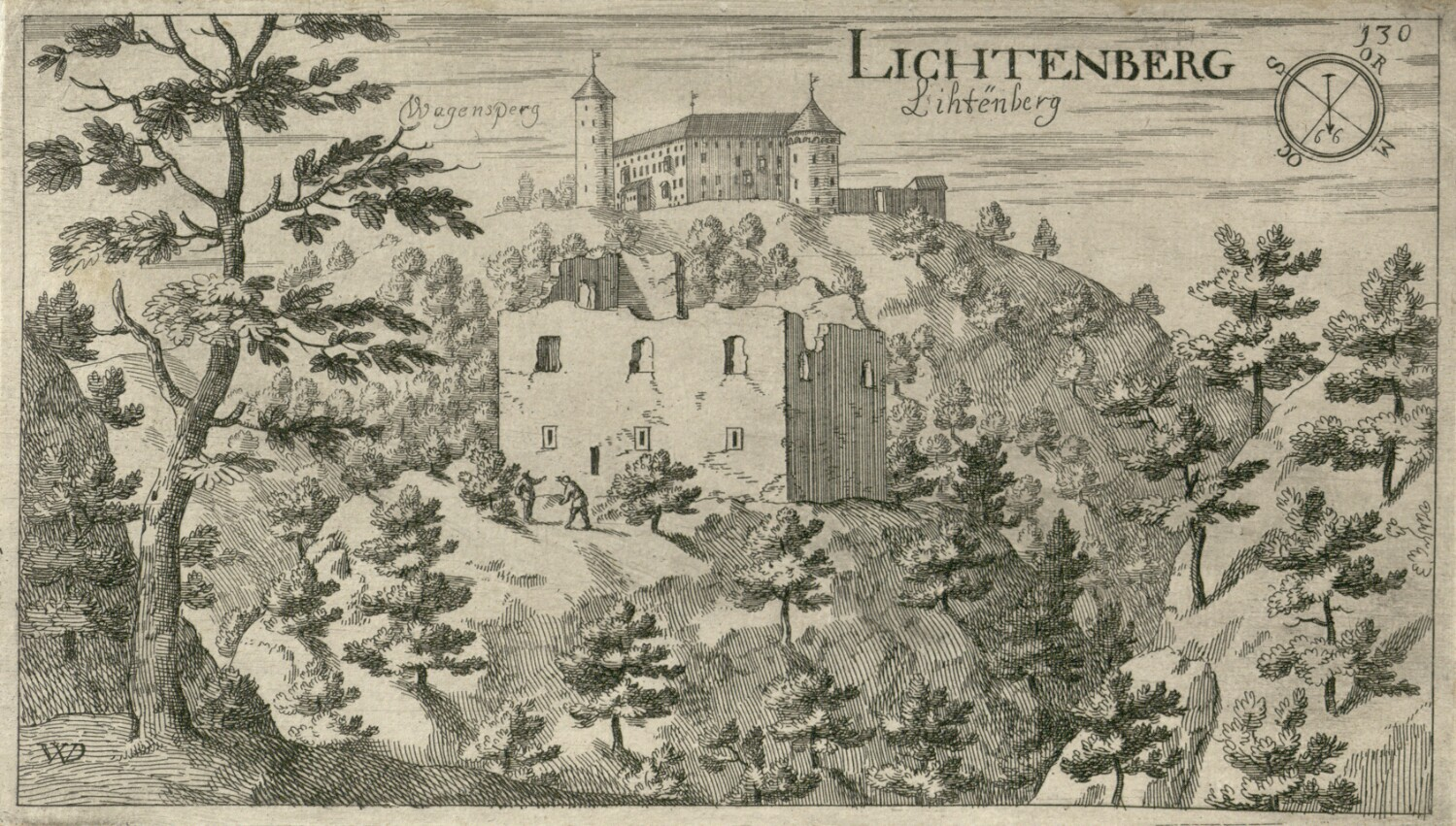 Grad Lihtenberk, v ozadju Bogenšperk